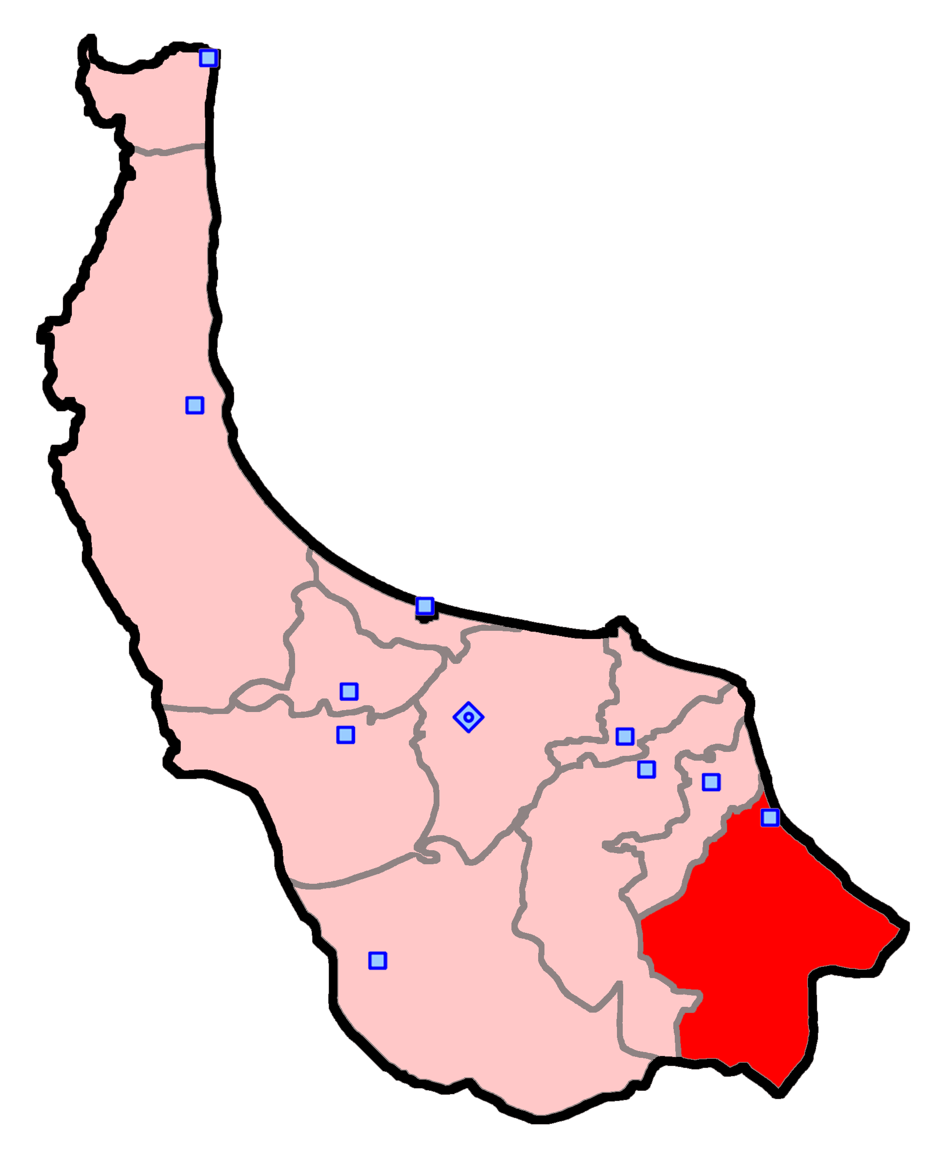 رودسر و املش برای انتخابات مجلس شورای اسلامی